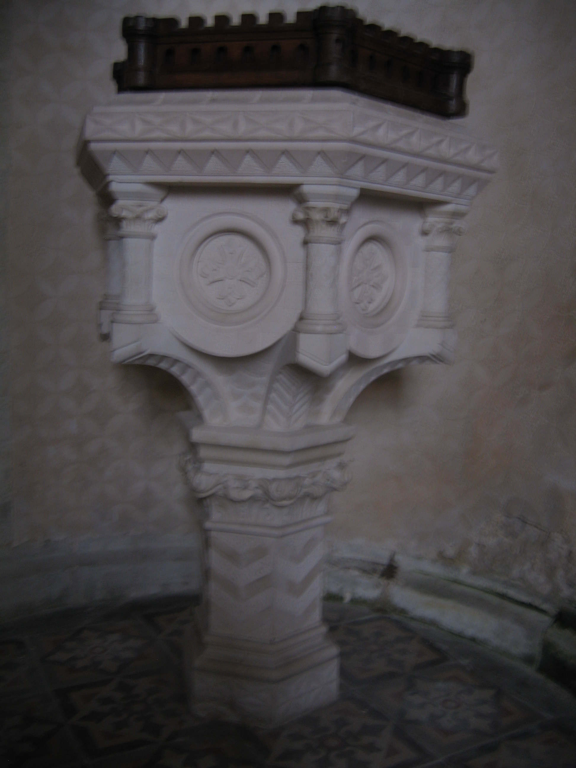 Pierre blanche de Poitiers, 1878